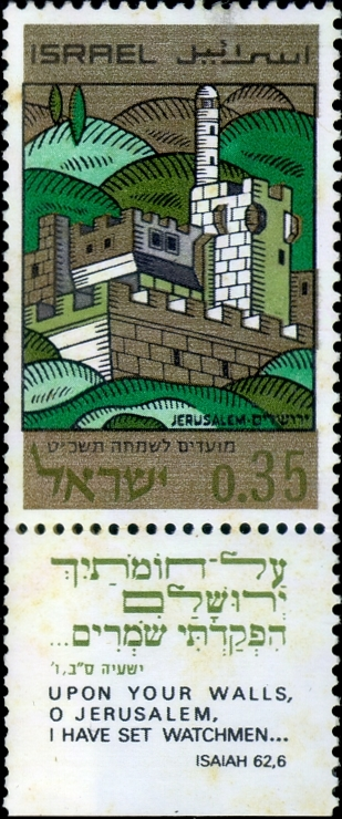 בולי מועדים לשמחה תשכ"ט